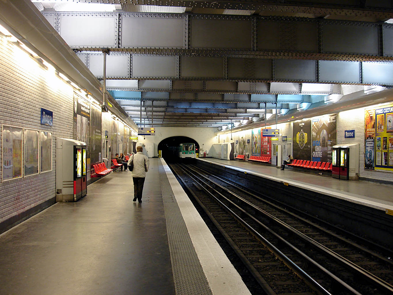 Station Rome de la ligne 2 du métro de Paris, France.